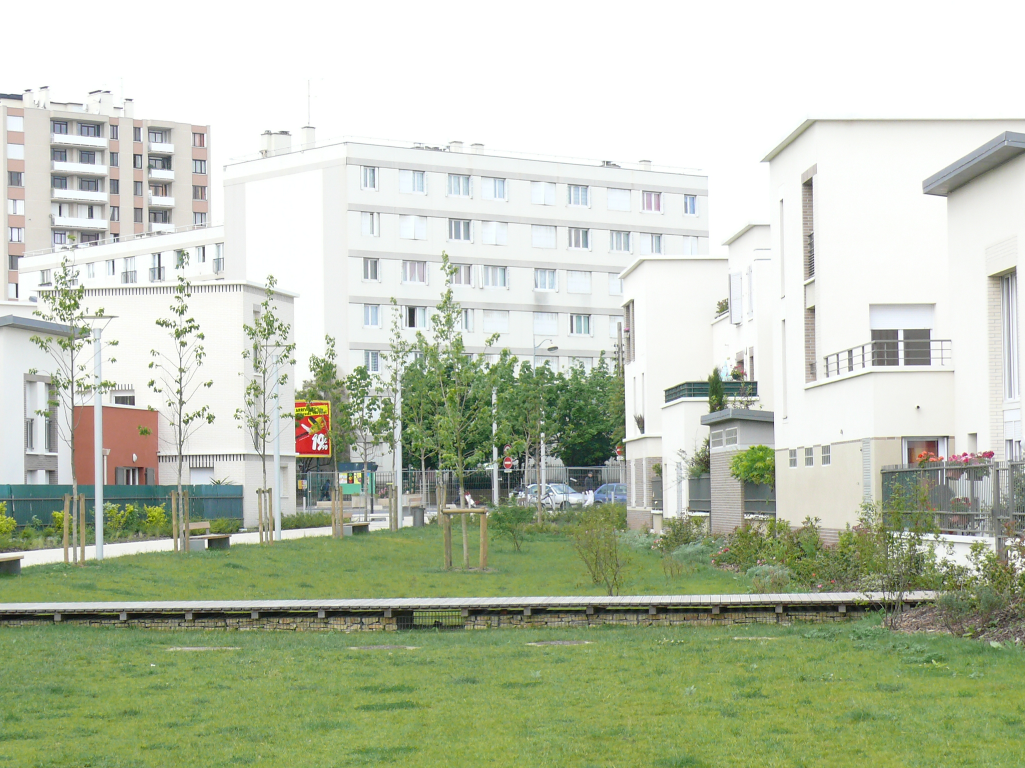 Bassin paysager d'assainissement pluvial réalisé dans la ZAC Ducos à Stains (Seine-Saint-Denis - Île-de-France, France)